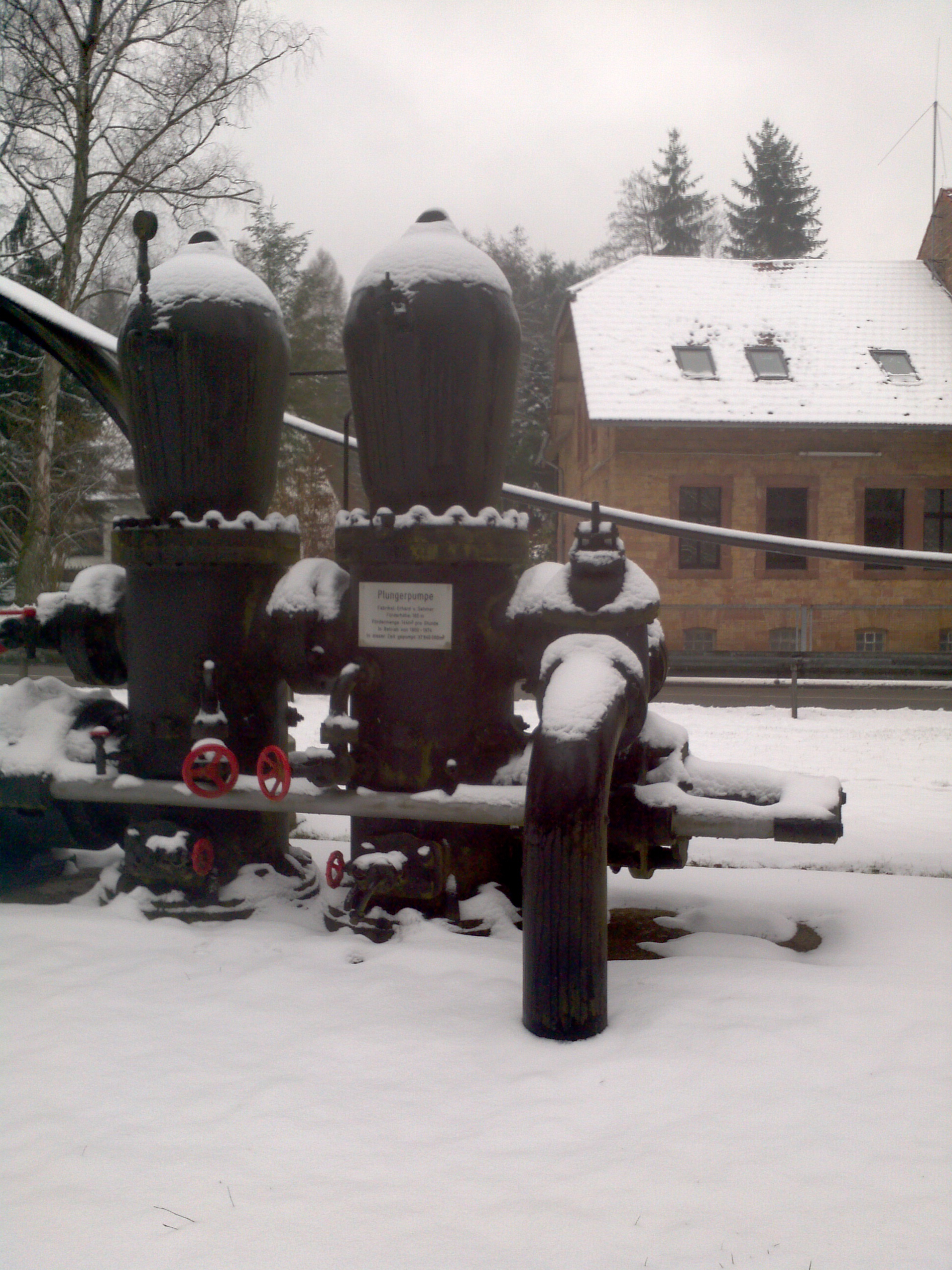 Plungerpumpe am Wasserwerk Spiesermühltal, Spiesen-Elversberg